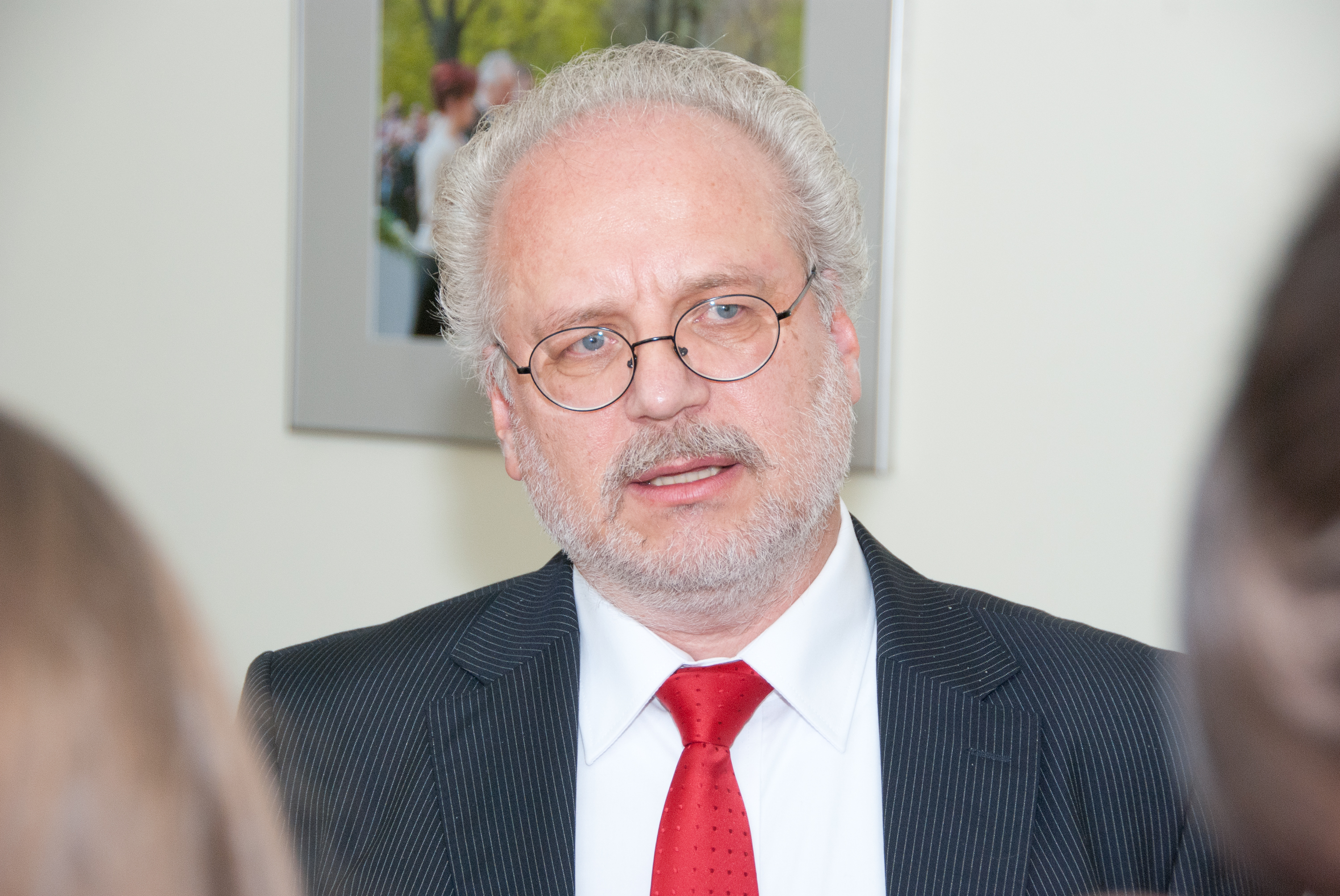 Foto: Toms Norde, Valsts kanceleja